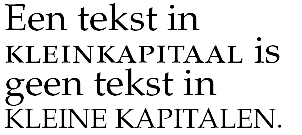 Illustratie van het verschil tussen kleine kapitalen en kleinkapitaal. Merk op dat de de kleine kapitalen eigenlijk nog iets groter zijn dan de kleine letters, maar dat ze al een stuk smaller zijn, terwijl de tekst in kleinkapitaal qua dikte van de letters goed aansluit bij de kleine letters. Lettertype: Palatino (lettertype) (Eigenlijk: URW Palladio), eigen werk.